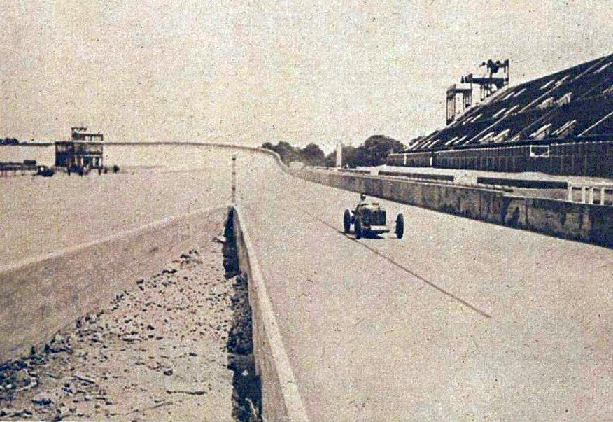 Pierre de Viscaya et sa Bugatti en juillet 1925 lors des essais du Grand Prix de France, sur la rampe descendante de l'autodrome de Linas-Monthléry (à gauche la rampe montante).